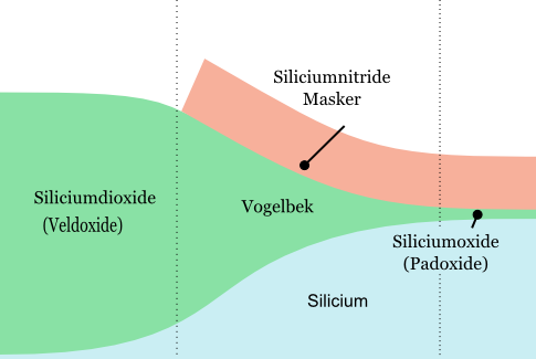 Illustratie van de vorming van de vogelbek (Eng: Bird's beak) die optreedt het bij LOCOS procédé